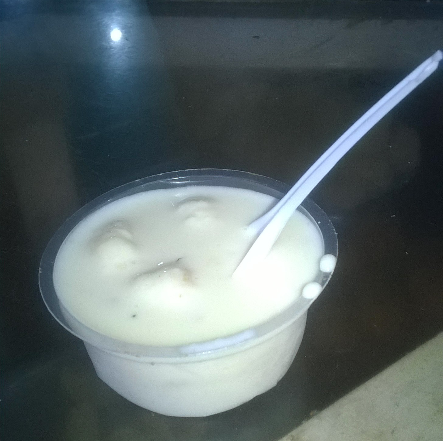 পাত্র ভর্তি রসমালাই। চাঁদপাড়া বাজার থেকে ১ কিকি দূরে চাঁদপাড়া-পাল্লা রোডের পাশে একটি ছোট মিষ্টির দোকানে। দুধ, দুধের সর, ছানা ও ময়দা দিয়ে তৈরি হয় এই রসমালাই